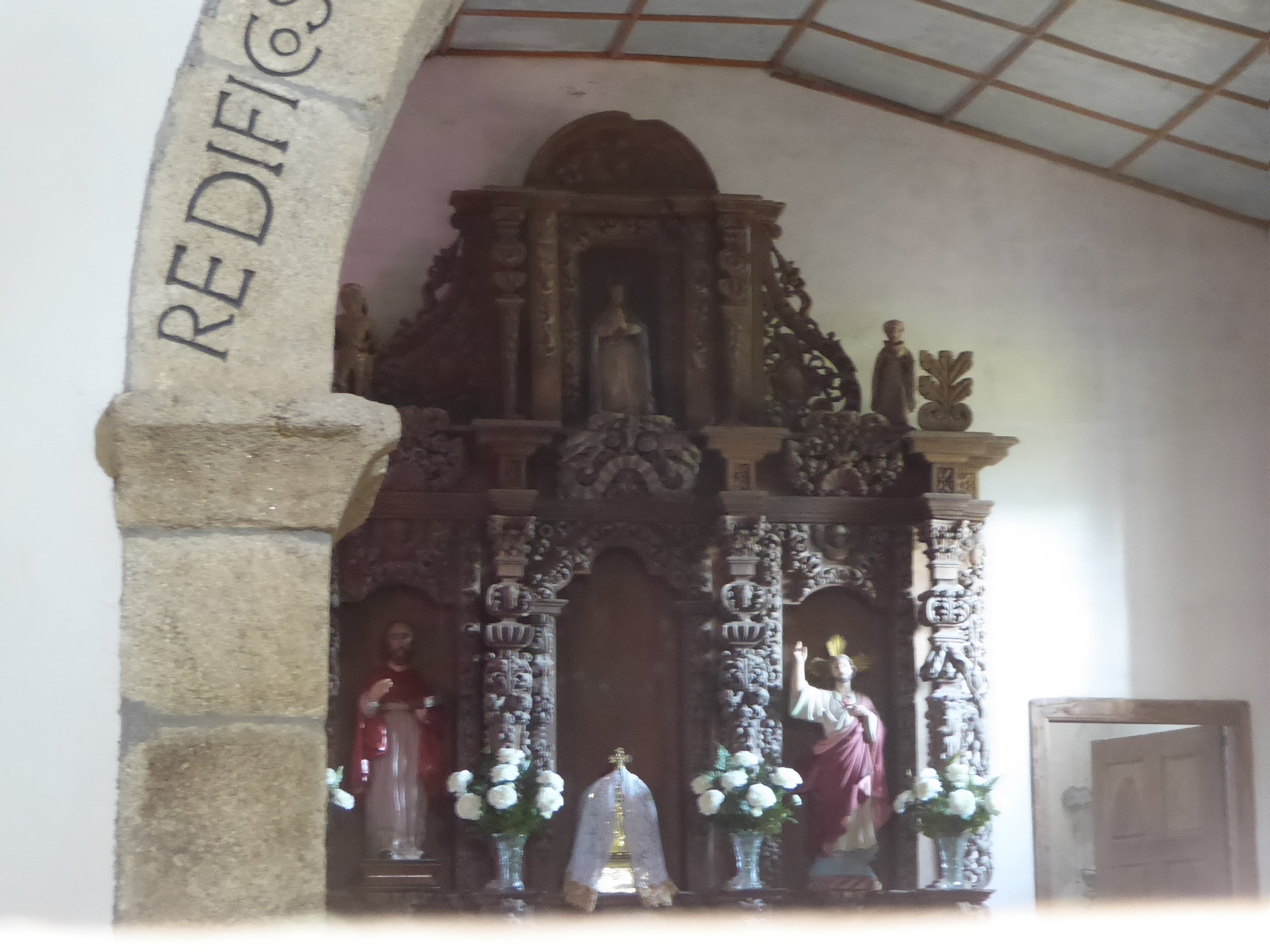 Interior de la Capilla de San Marcos. El retablo de la misma se atribuye a Francisco de Moure